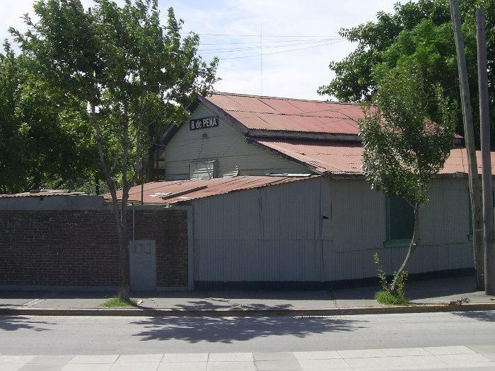 Fachada a boletería